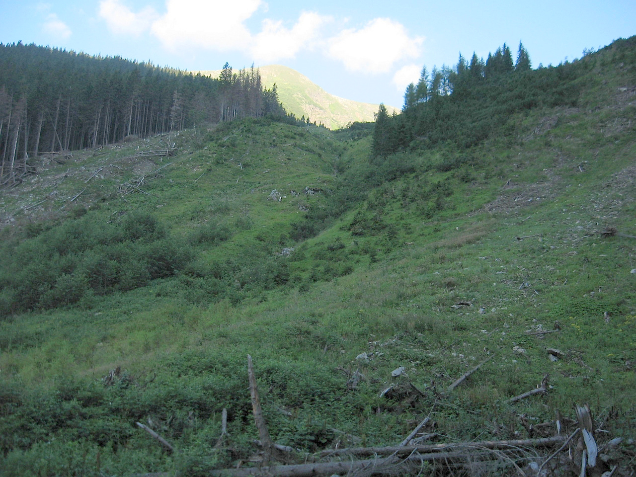 Widok z Doliny Jamnickiej na Pusty Żleb i Polanę pod Pustem, w tle Szczerbawy (z lewej) i Baraniec